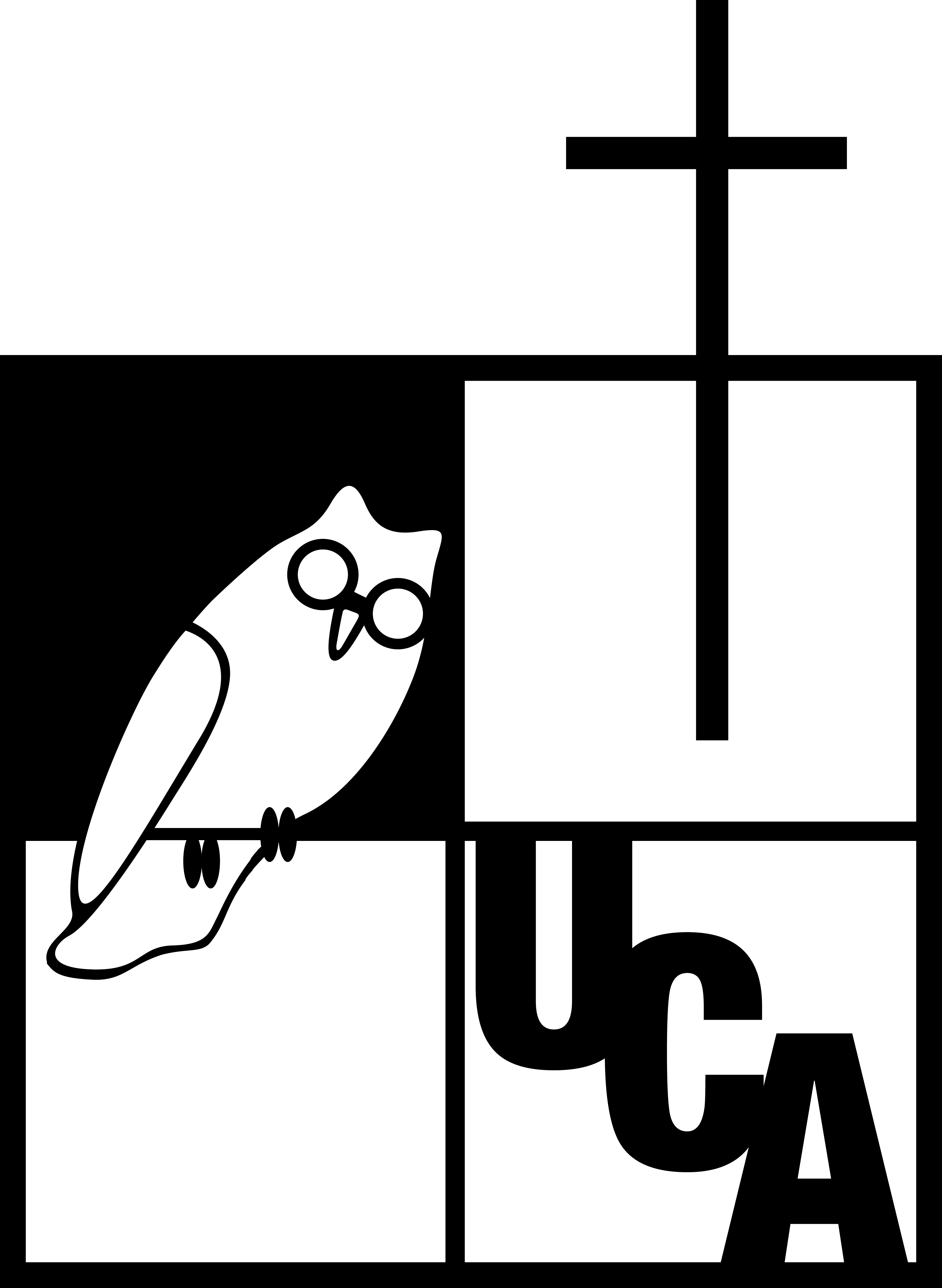 Logo Universidad Centroamericana José Simeón Cañas